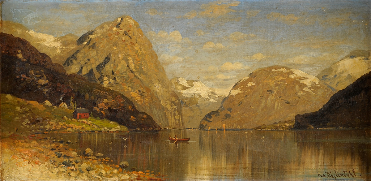 Sommerliche Fjordansicht. Signiert. Öl/Lwd., 30 x 60 cm